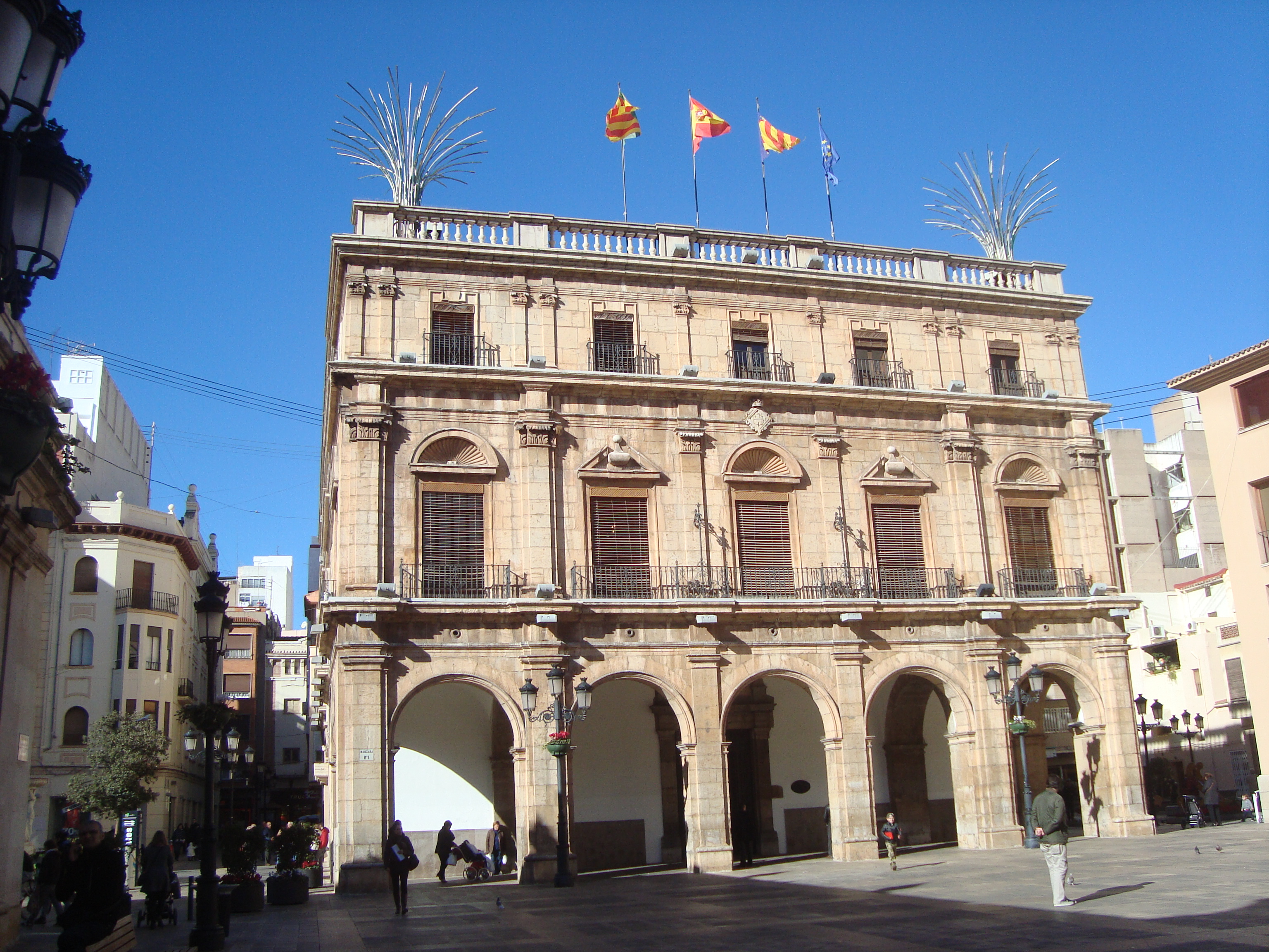 Edifici de l'Ajuntament de Castelló de la Plana (Castelló, Comunitat Valenciana)